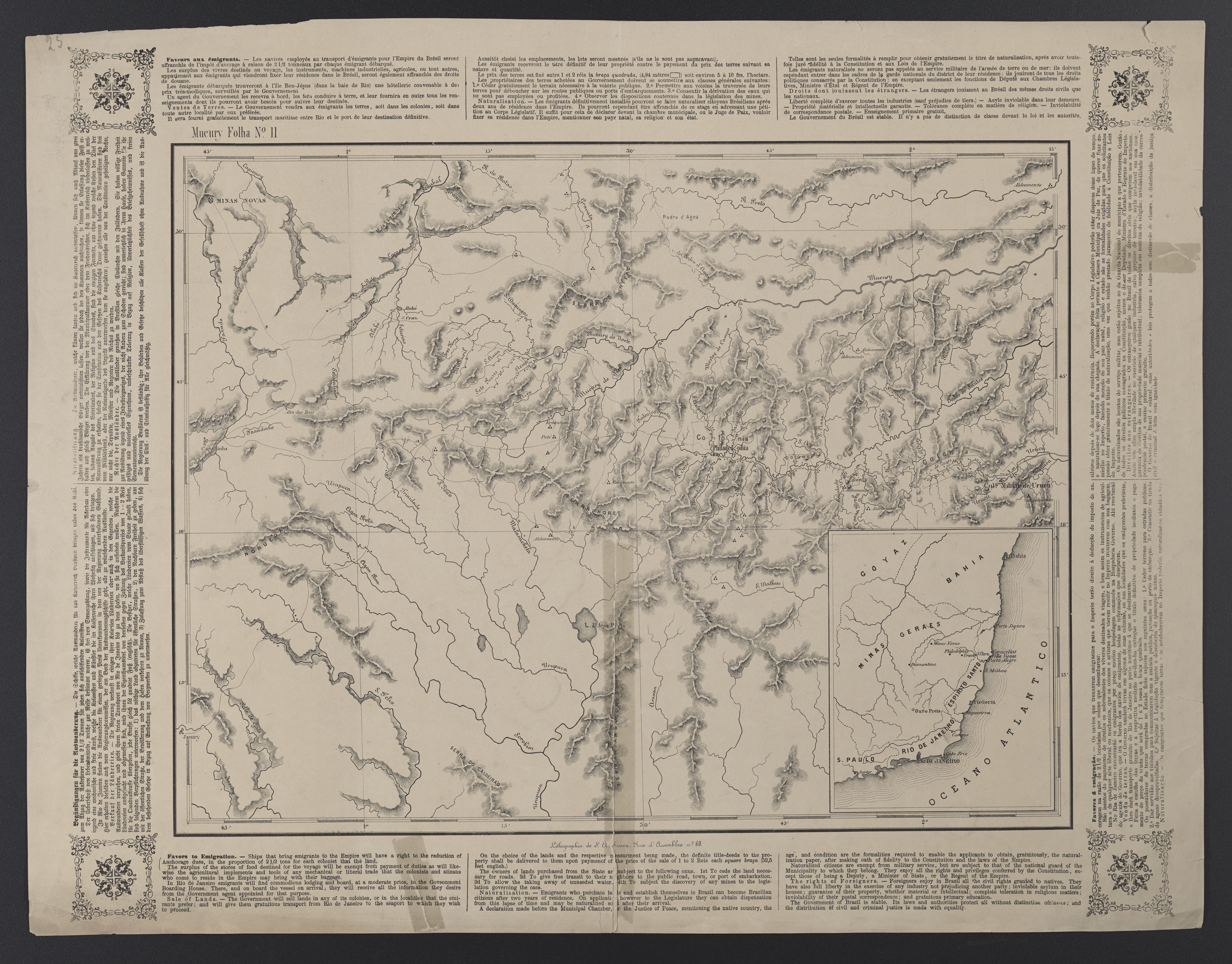 1 Kt. : unkolor. (43 x 33 cm); Koordinaten W 42°40'00"-W 40°54'00"/S 17°09'00"-S 18°19'00"; Ohne Maßstab. - Mit Erl. für Einwanderer in engl. (unten), dt. (rechts), franz. (oben) und port. (links). - Mit 1 Übersichtskarte zu den Provinzen im Südosten Brasiliens. - Mit Zählung: Mucury Folha N[umer]o II. - Relief: Schraffen